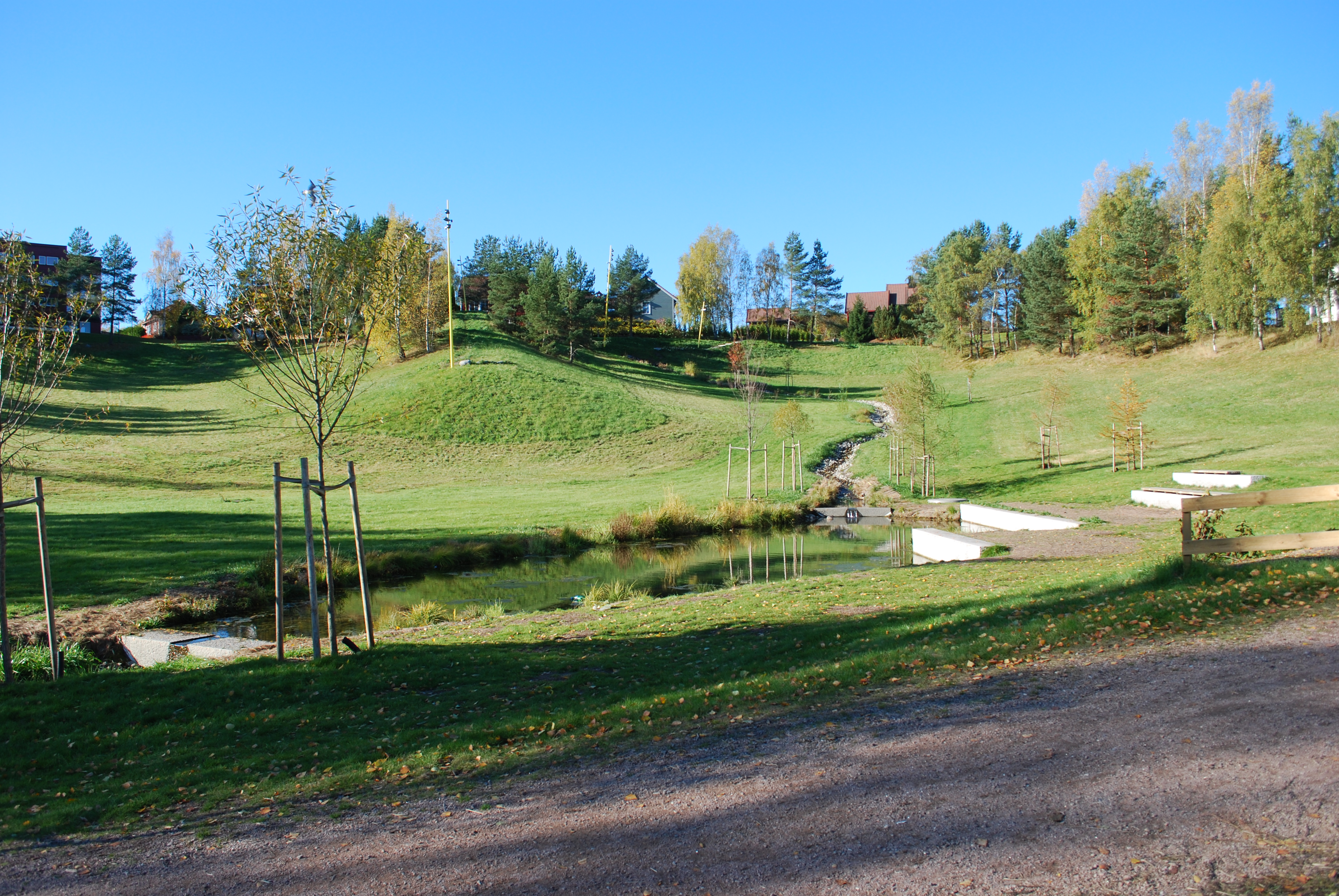 Verdensparken, Furuset, Oslo, med ravinedaler bekk og dam, sett mot vest